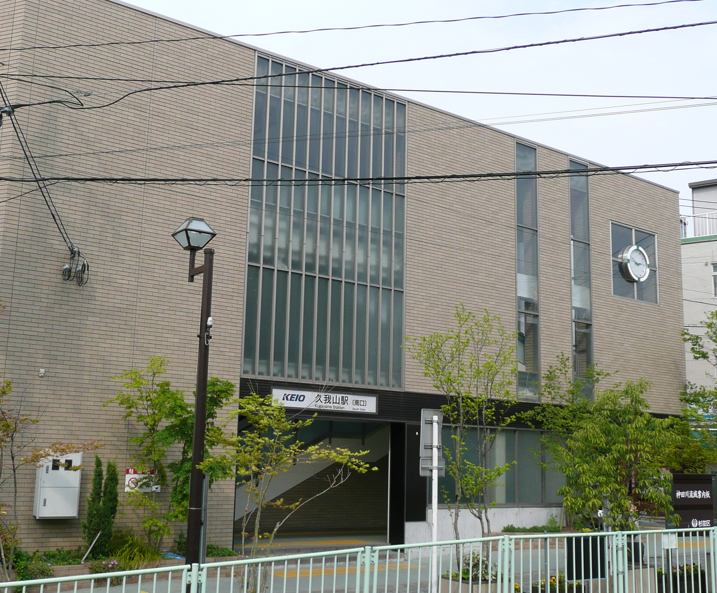 久我山駅南口